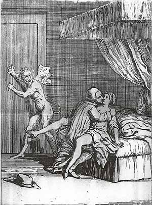 Seduction of Marie-Catherine Cadière by Jean-Baptiste Girard. From: Histoire du Père Jean-Baptiste Girard, Jésuite & Recteur du collège de la Marine à Toulon, et de Damoiselle Marie Caterine [!] Cadière. Divisé en 32 planches ; contenant les faits principeaux [!] mentionés [!] au Procès suivant les Factum imprimés par Gissey de Bordelet. A Paris, s.d., (1735).